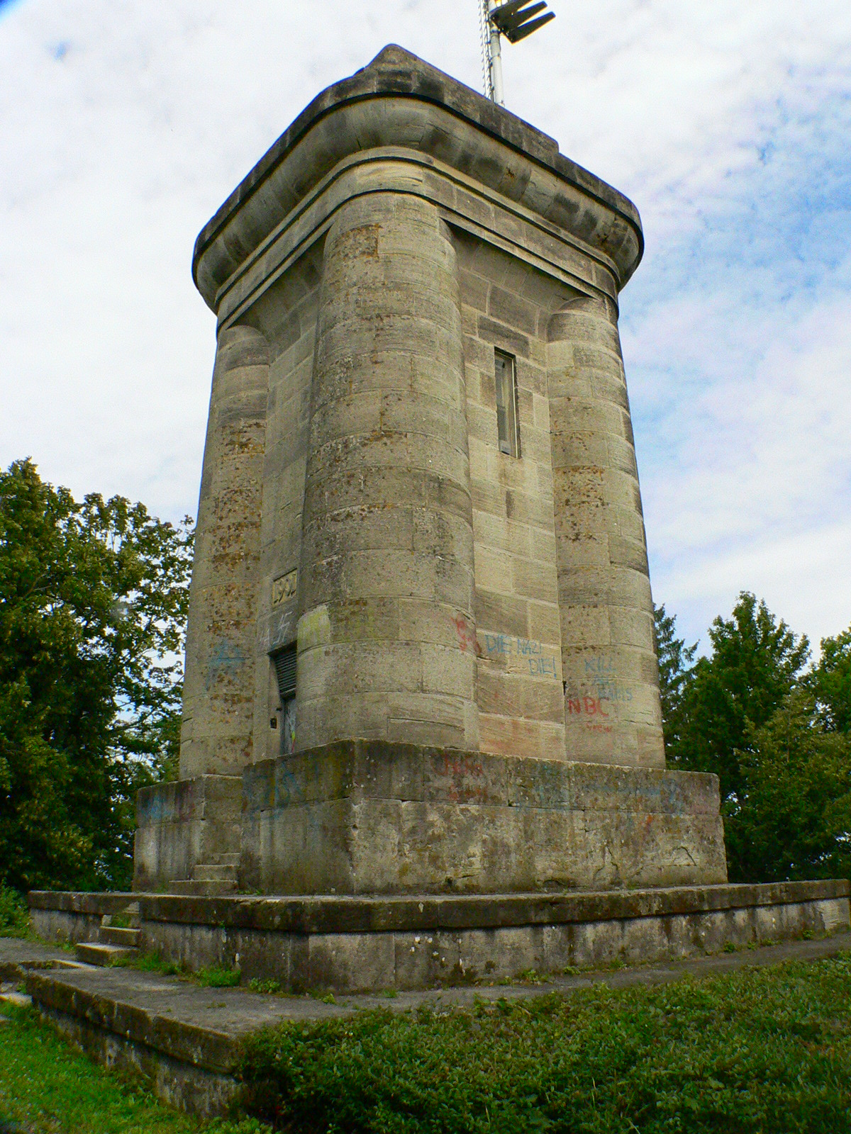 Bismarckturm in Coburg, Franken, Deutschland